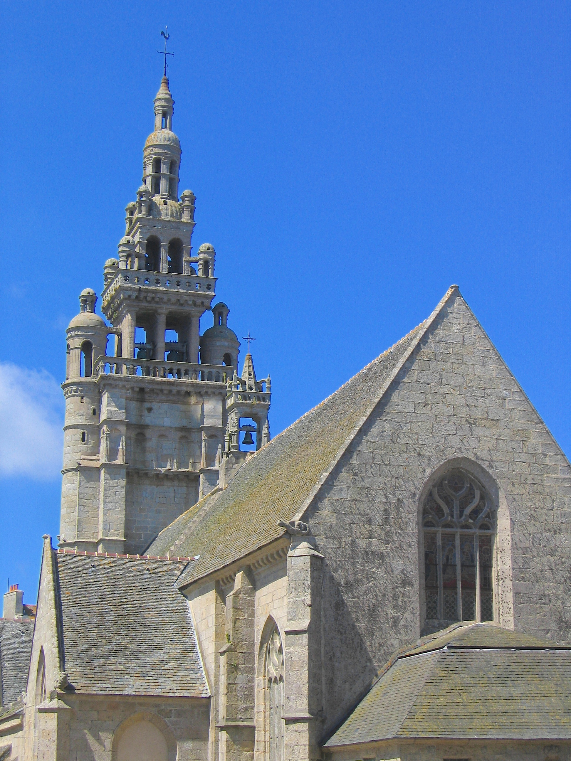 L'église de Notre-Dame de Croaz Batz à Roscoff vue de l'arrière.